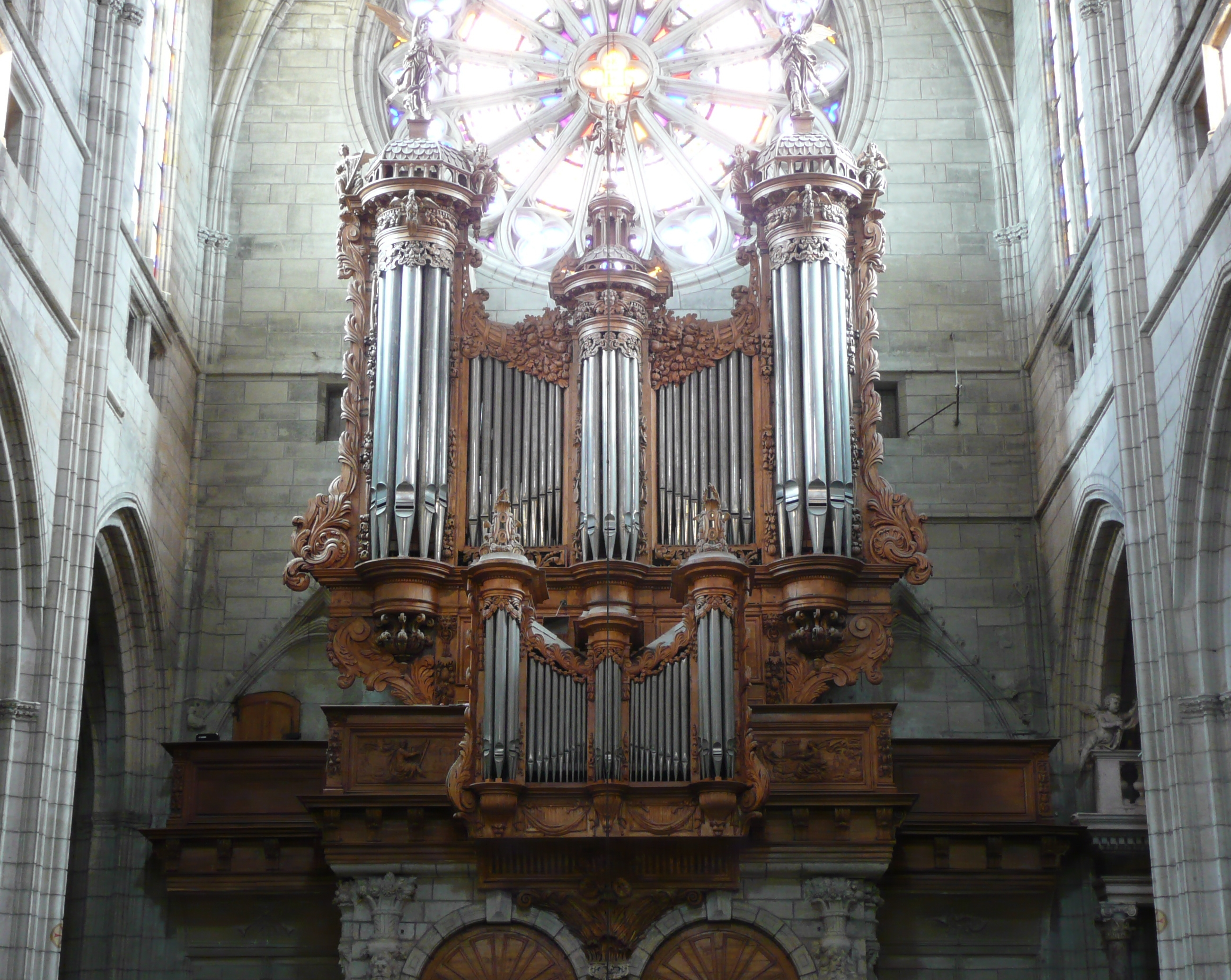 Une des 7 Merveilles Organistiques de l'Hérault; sinon le plus beau, en tout cas le buffet le plus ancien, 1624, dû à Guillaume Martois, de style Louis XIII.